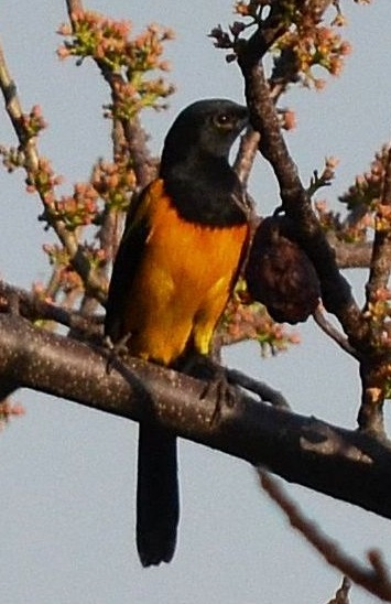 Icterus wagleri (bolsero de Wagle), Tepoztlán, Morelos, México.